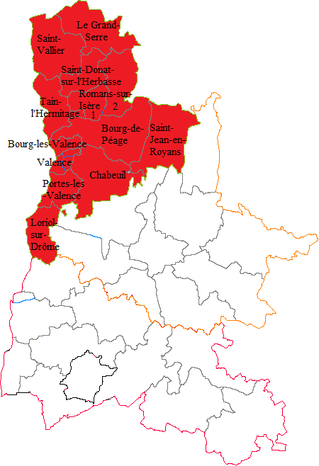 Carte de l'arrondissement de Valence dans la Drôme